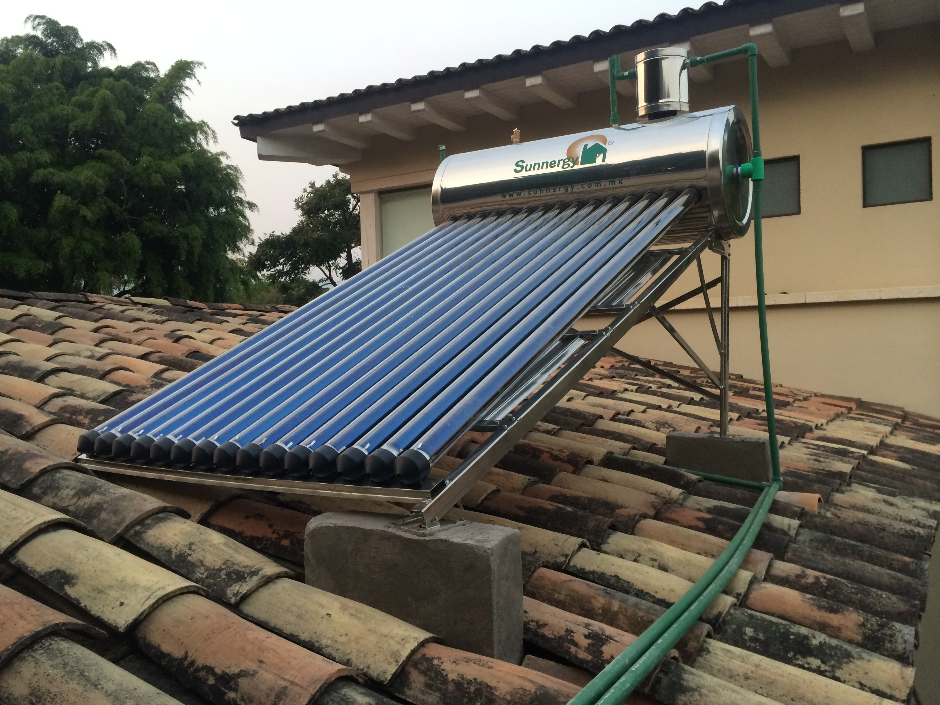 Estos equipos se instalan en casas que cuentan con un Hidroneumatico ,bombas presuriza-doras o un tinaco con una elevacion mayor a los 2.5 mts ya que cuentan con un sistema integrado que difumina la presión del agua para que esta no pueda afectar la integridad de los tubos de borosilicato.